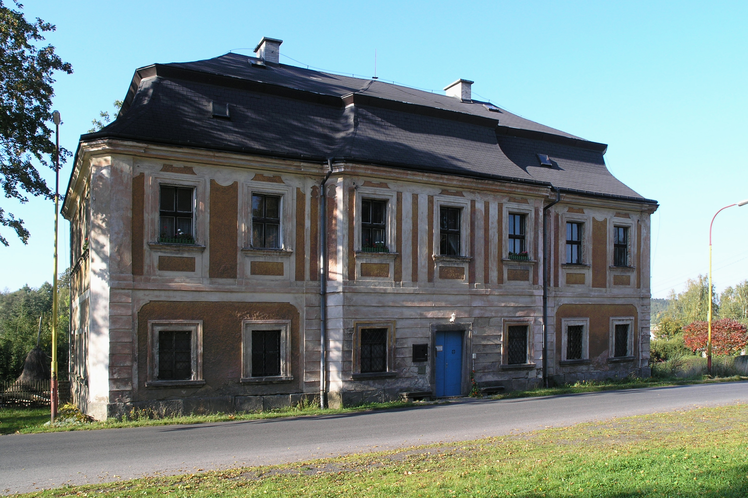 Budova fary ve Starých Křečanech